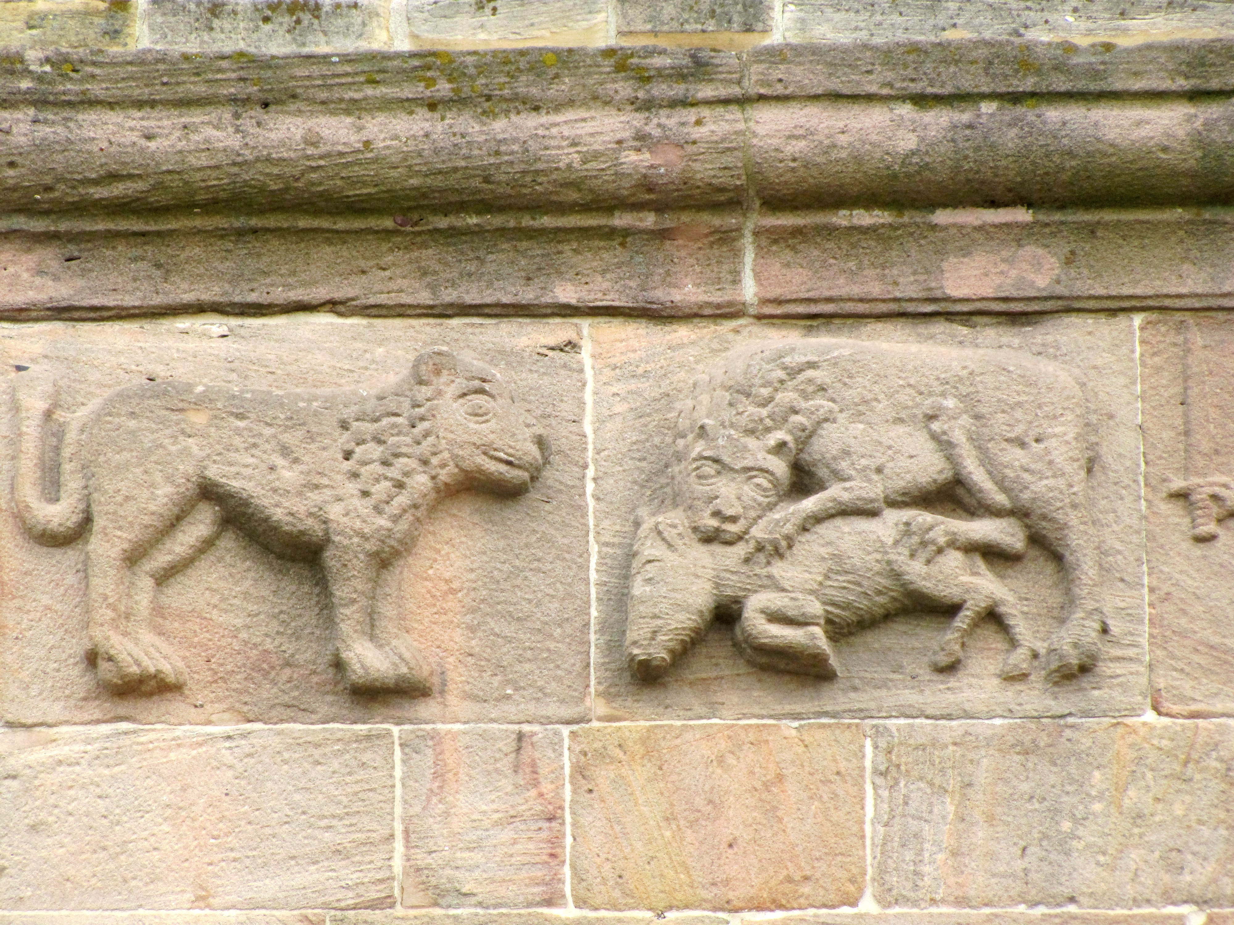 Alsace, Bas-Rhin, Église Saints-Pierre-et-Paul dite Sainte-Richarde (PA00084587, IA00115010). Bas-relief roman sur la frise extérieure: scène de chasse avec lions.